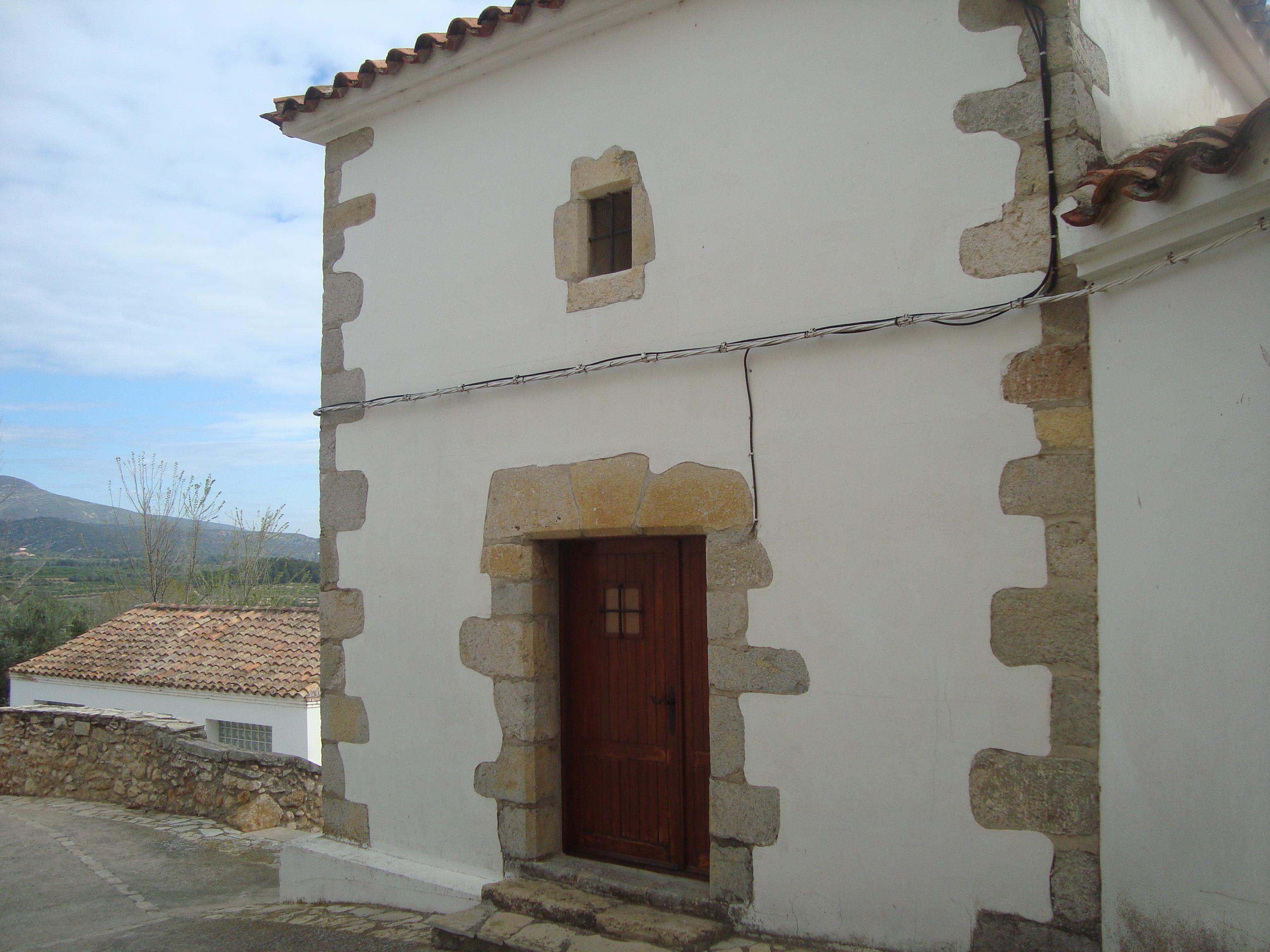 Ermita de la Mare de Déu de la Font (la Torre d'en Doménec) 05.120-002.